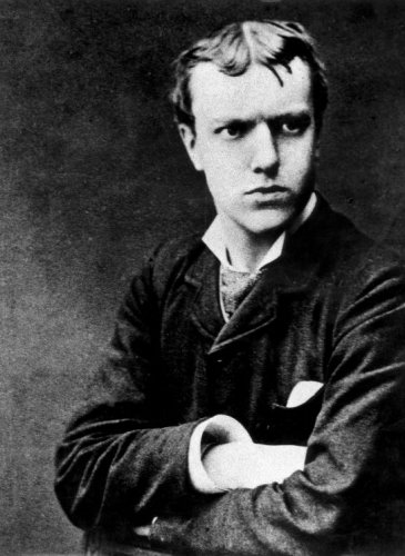 Portret van schrijver Lodewijk van Deyssel, pseudoniem voor Karel Joan Lodewijk Alberdingk Thijm (1864-1952). Fotograaf A. Greiner, datum juli 1882